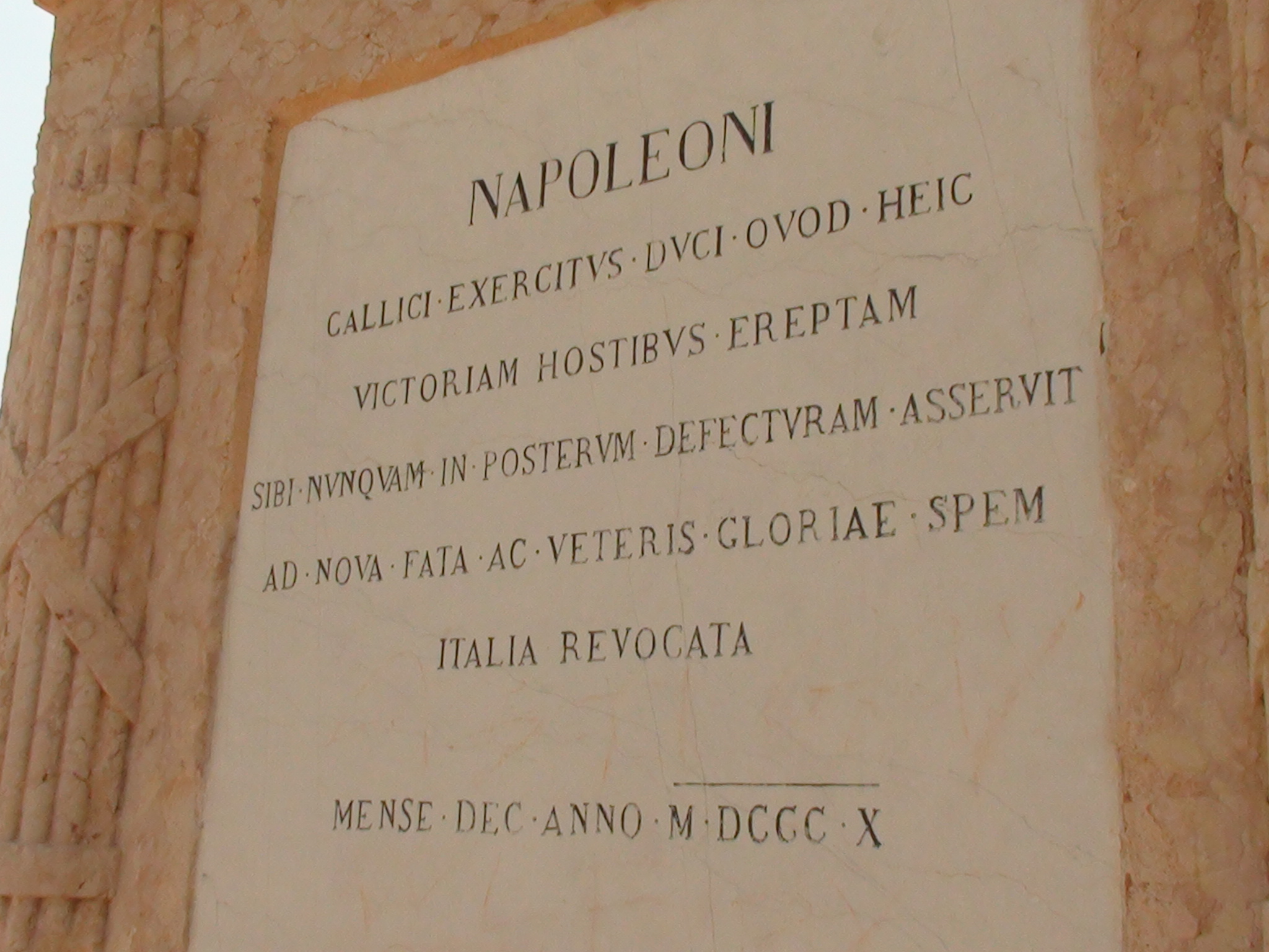 Écrit en latin sur le monument